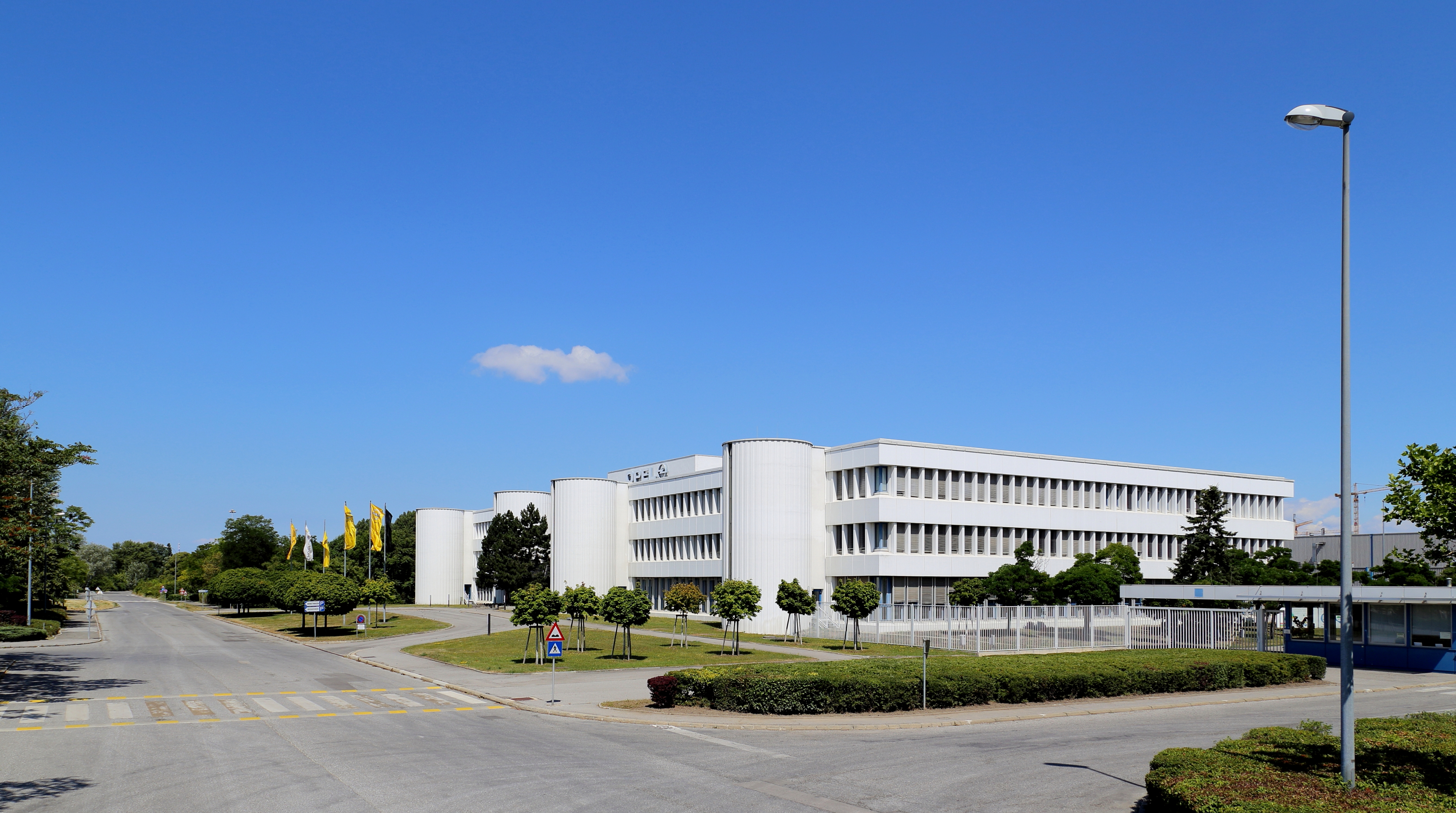 Das südseitig der Produktionshalle situierte Verwaltungsgebäude des Opelwerkes in Aspern, ein Ortsteil der Bundeshauptstadt Wien.